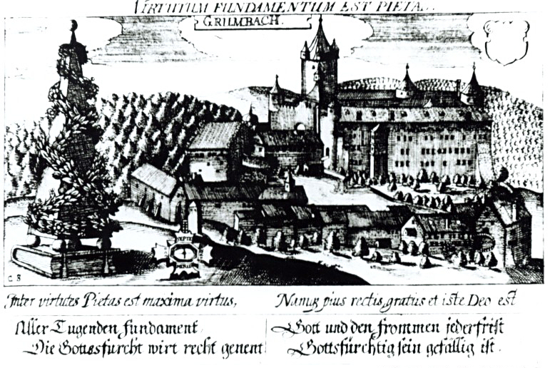 Grumbach (Glan) Stich aus Daniel Meisners «Schatzkästlein»